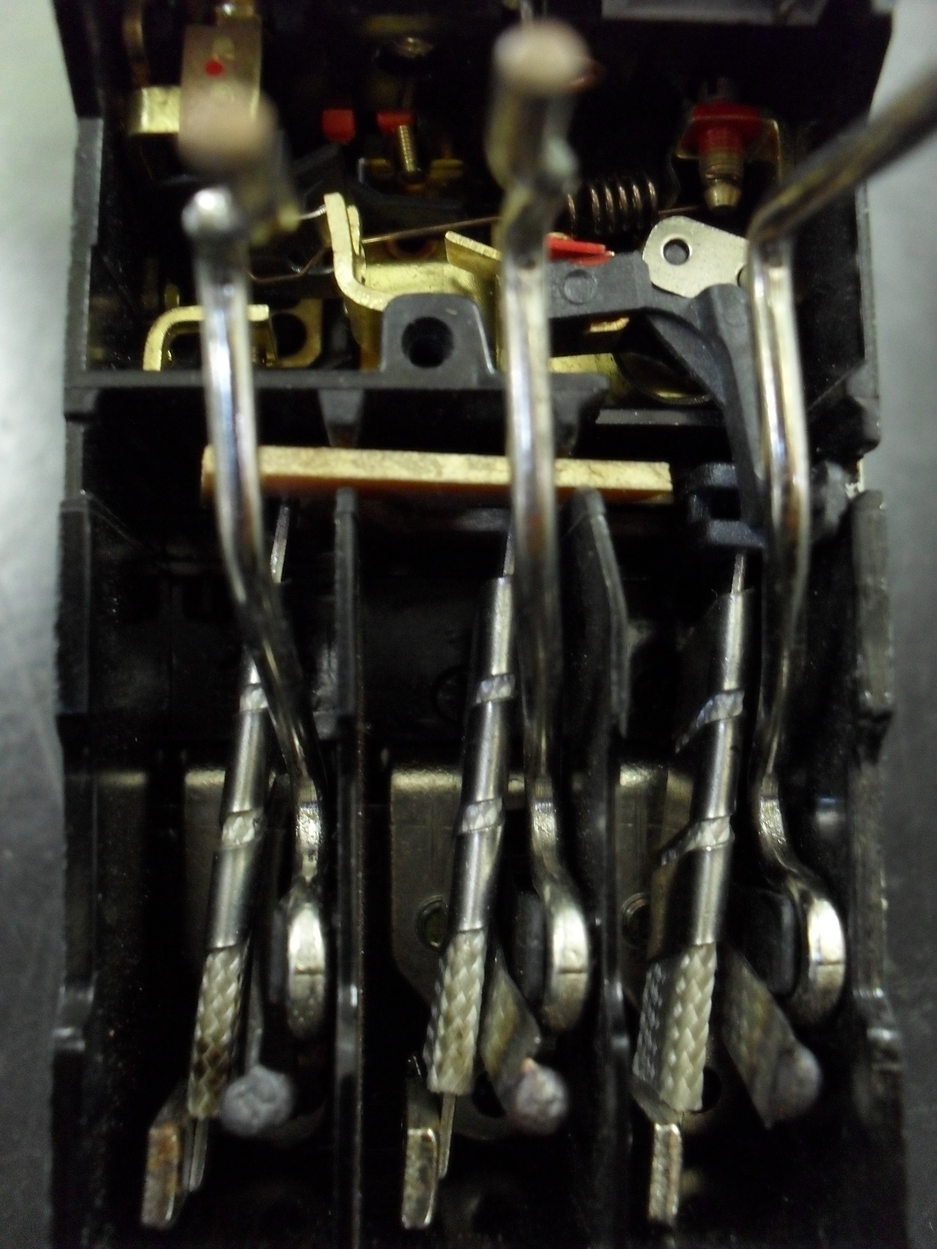 Imagem de Relé Térmico do Laboratório de Eletrificação Rural da Universidade Federal de Lavras (Cortesia).